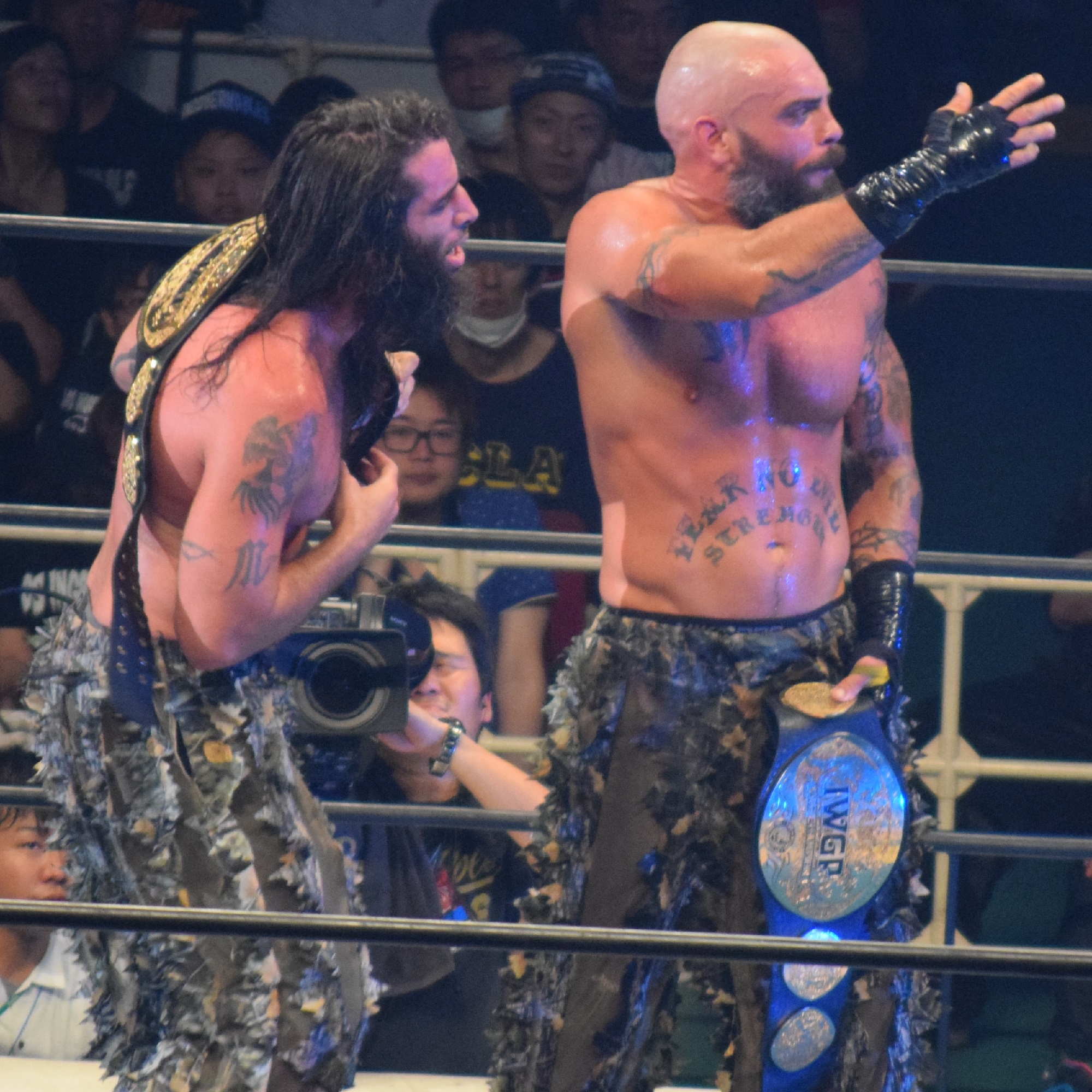 2016年6月19日 大阪城ホール 「DOMINION 6.19 in OSAKA-JO HALL」 ブリスコ・ブラザーズ（ジェイ・ブリスコ & マーク・ブリスコ）